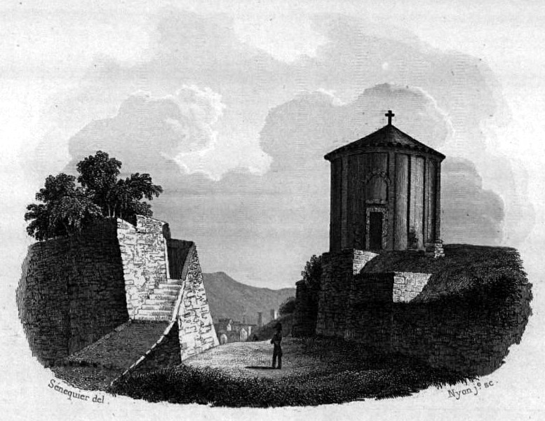 Image en provenance du livre : Eusèbe Girault de Saint-Fargeau, Guide pittoresque du voyageur en France, contenant la statistique et la description complète des quatre-vingt-six départements, orné de 740 vignettes et portraits gravés sur acier, de quatre-vingt-six cartes de départements et d'une grande carte routière de la France, par une Société de gens de lettres, de géographes et d'artistes, Paris, F. Didot frères, 1838, 6 volumes in-8° (BNF : 8-L25- 46). Volume III Didot frères, 1838. Route de Paris à Nice traversant les départements de l'Isère, des Hautes-Alpes, des Basses-Alpes et du Var. auteurs dessins : Rauch (ou autre) auteurs gravures : Skelton fils, Schroeder, Bishop (ou autre)